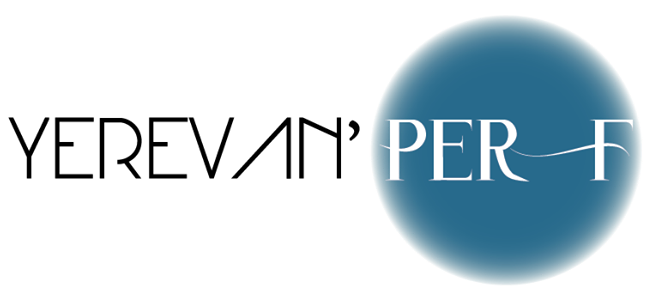 Yerevan Perf Festival